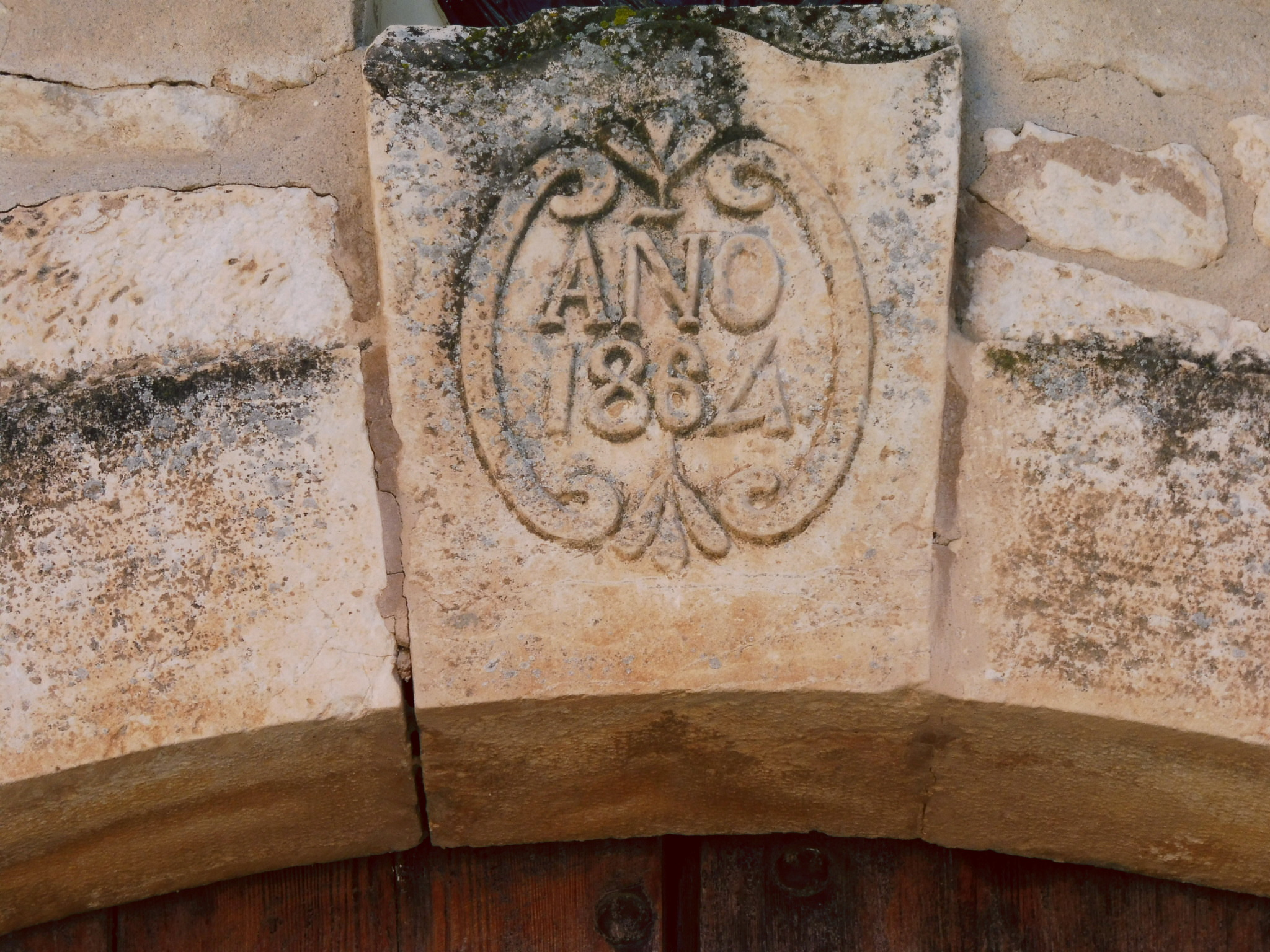 Església de Sant Antoni de Pàdua d'Alberola (Os de Balaguer): clau del portal